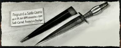 O punhal que Sante Caserio utilizou para eliminar o presidente Sadi Carnot